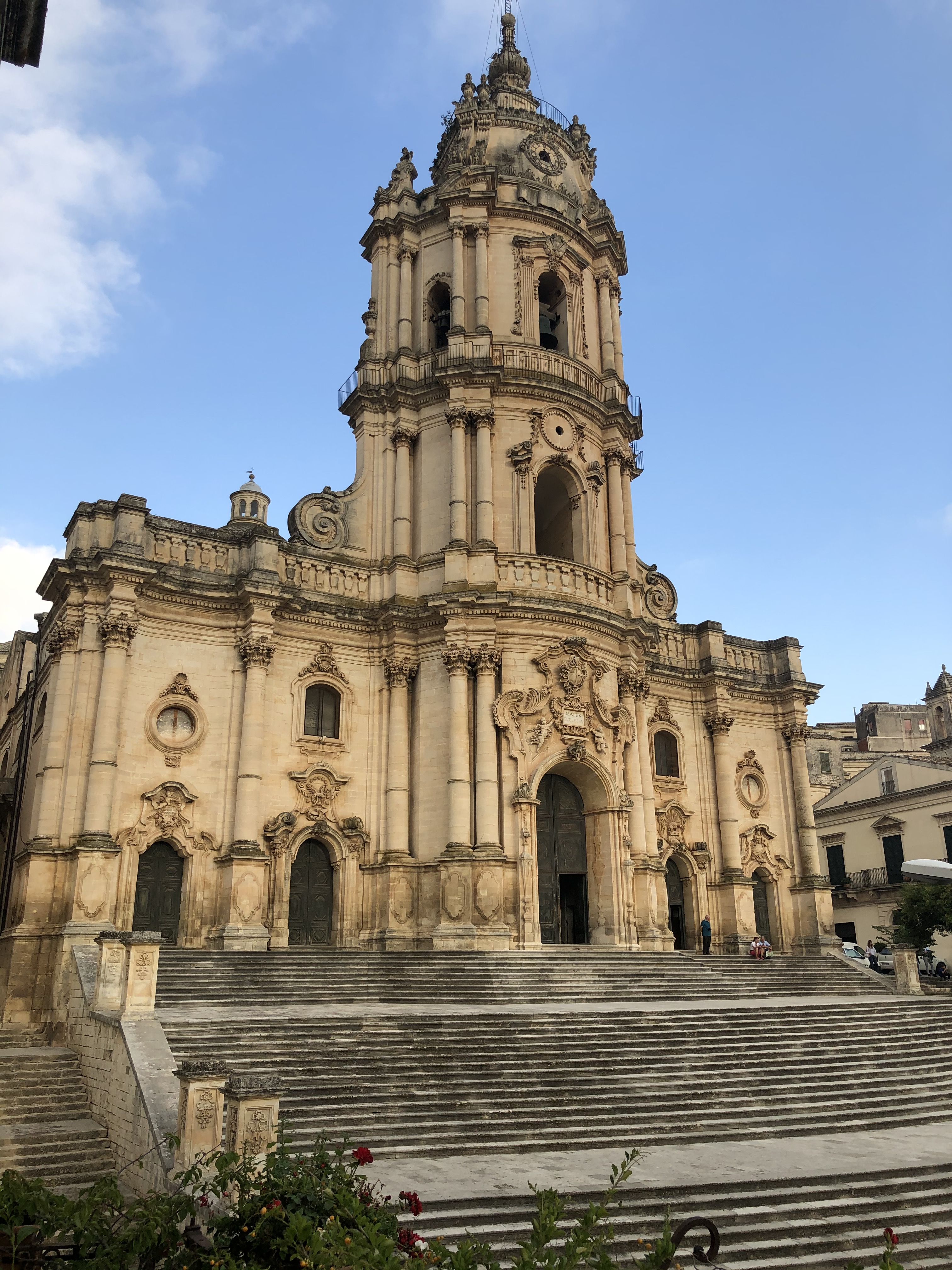 Il duomo da Palazzo Castro-Polara Grimaldi